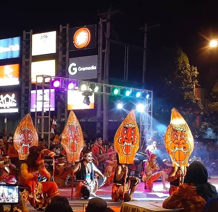 Pagelaran budaya di Purwokerto